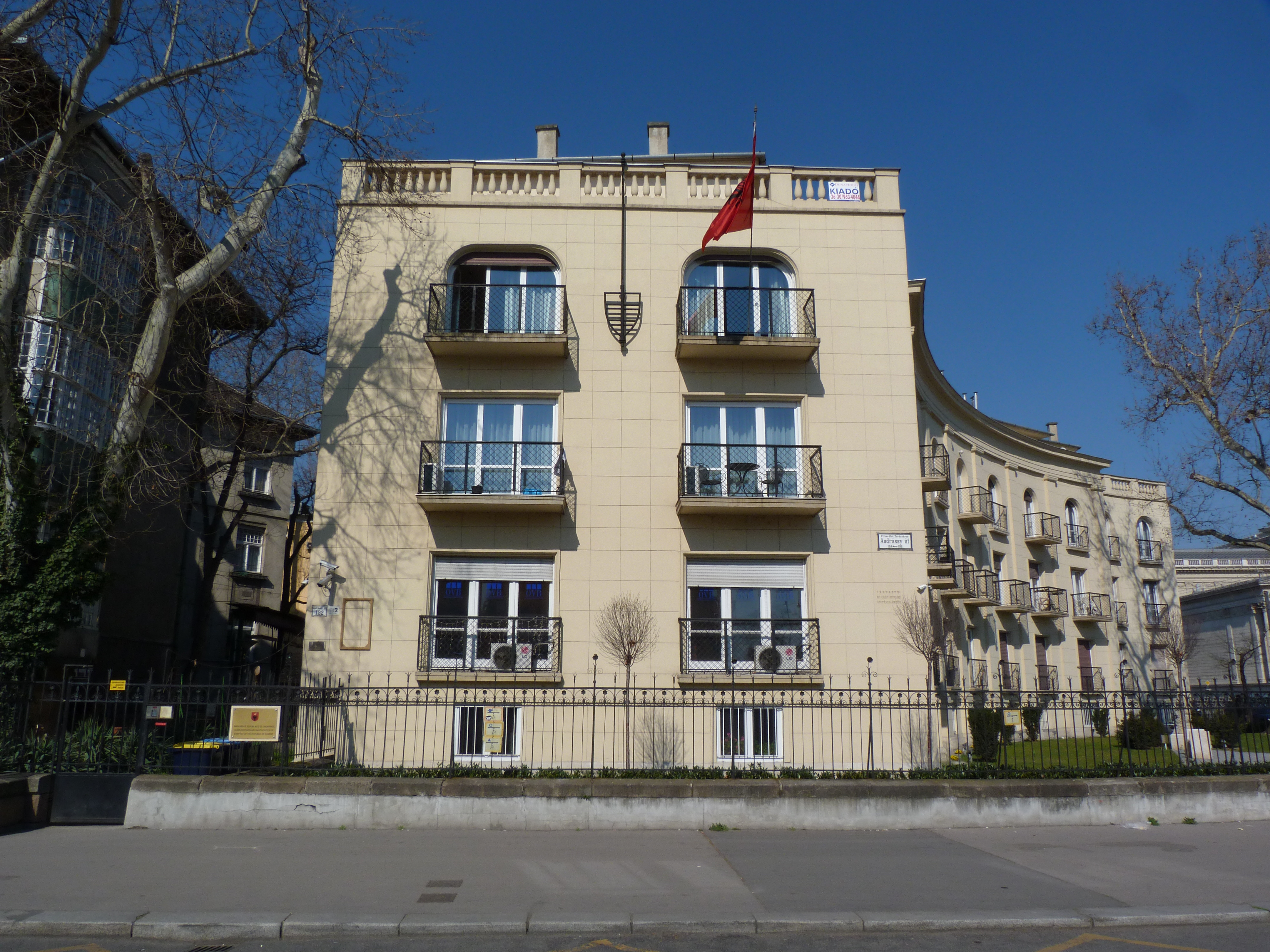 Albánia Nagykövetsége. Budapest, VI. Andrássy út. - - ©© Derzsi Elekes Andor, Budapest, 2015, A fénykép másolását és felhasználását a szerző ellenérték nélkül, jogutódjaira is kihatóan megengedi. Az engedély kiterjed a kereskedelmi célú hasznosításra is. Kéri azonban nevének feltüntetését a felhasználás során. A Metapolisz sorozat valamennyi képe és filmje Creative Commons alatti. kereskedelmi - for profit - célra is felhasználható. Ajánlott hivatkozás: Derzsi Elekes Andor: Metapolisz DVD line